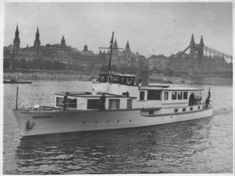 Hungária állami jacht --A felvétel 1943 – 1944-ben készült. Budapest, az Erzsébet hídtól északra eső Duna szakasz. A Belvárosi templom előtti Dunaszakasz. Közzétéveː 20170727